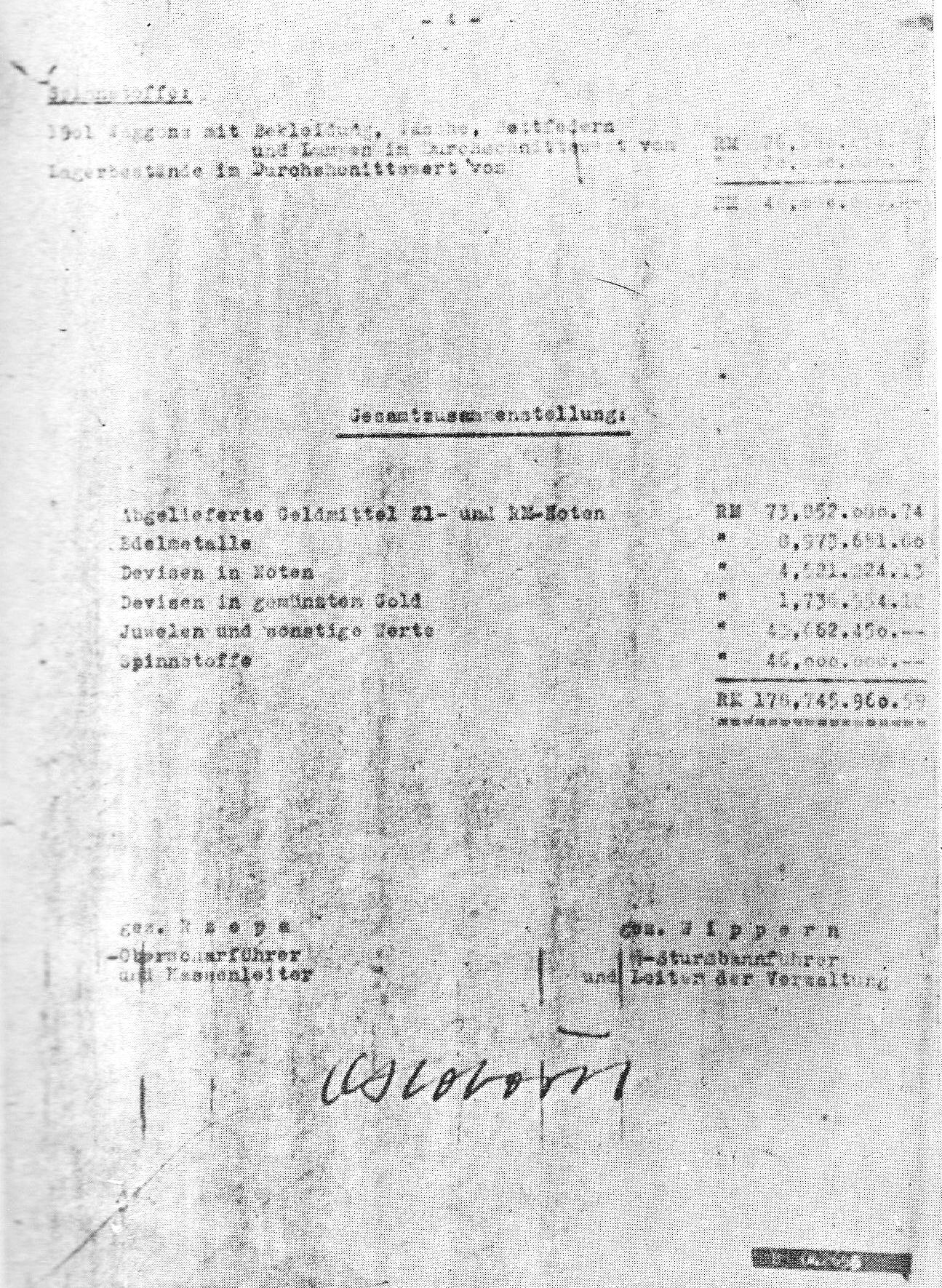 Ostatnia strona sprawozdania Odila Globocnika, podpisana także przez Oberscharführera Rzepę i Sturmbannführera Wipperna, o rozliczeniu akcji "Reinhardt"